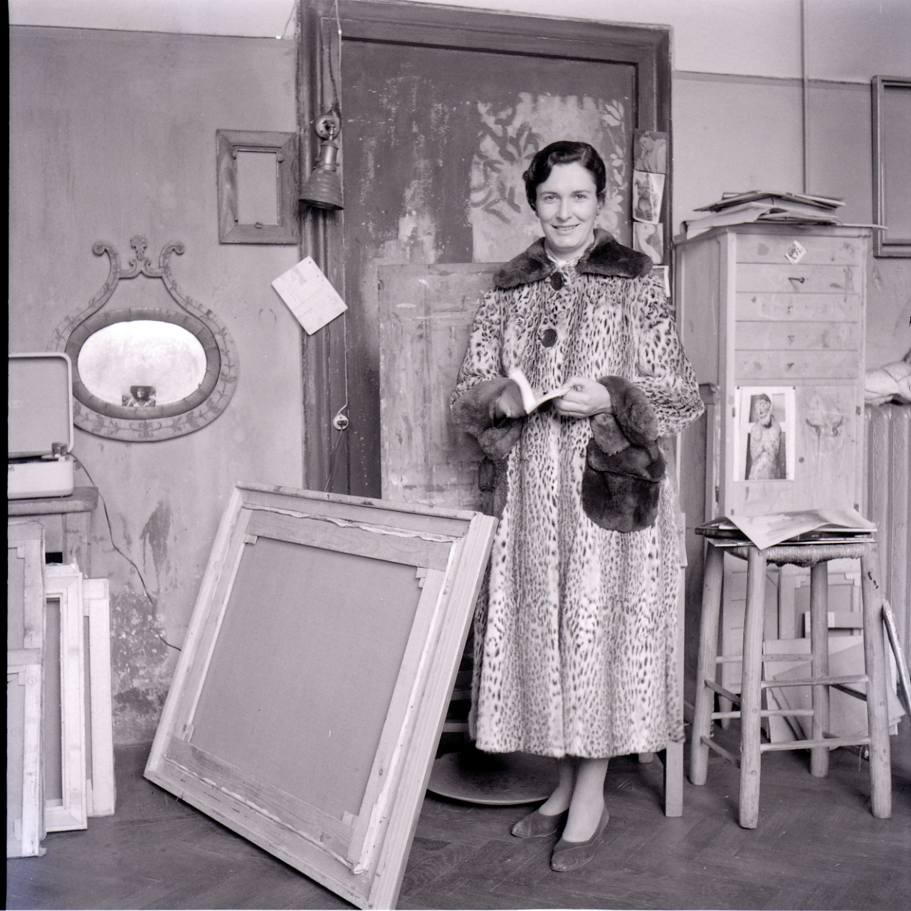 Probabile ritratto della scrittrice Milena Milani nello studio di Bruno Cassinari a Milano. Servizio fotografico : Italia, 1982 / Paolo Monti. - Buste: 28, Fototipi: 28 : Negativo b/n, gelatina bromuro d'argento/ pellicola ; 6x6. - ((Serie costituita da 28 buste di carta, tenute insieme da una graffetta, identificate con i nn.: R4229, R4230, R4231, R4232, R4233, R4234, R4235, R4236, R4237, R4238, R4239, R4240, R4241, R4242, R4243, R4244, R4245, R4246, R4247, R4248, R4249, R4250, R4251, R4252, R4253, R4254, R4255, R4256. - Sulla busta 4229: "Cassinari"